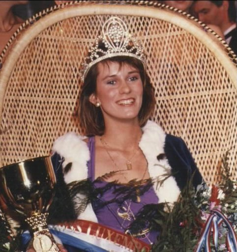 Criss Scott als Miss Lëtzebuerg.